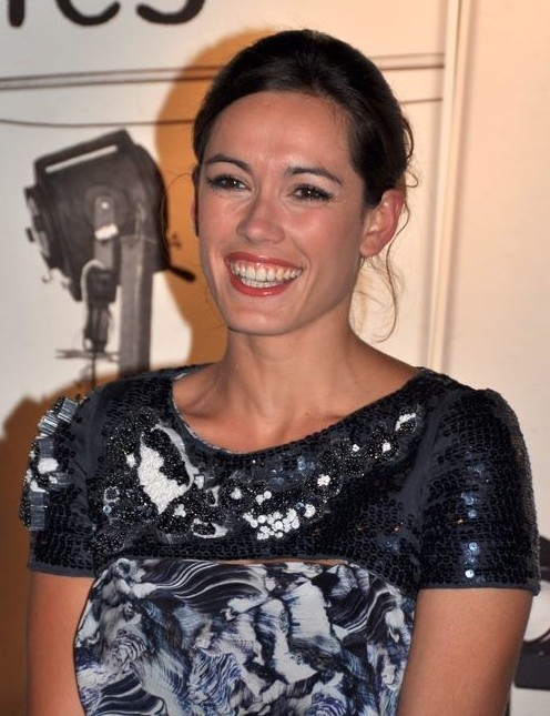 Leslie Coutterand à la cérémonie des prix Lumières